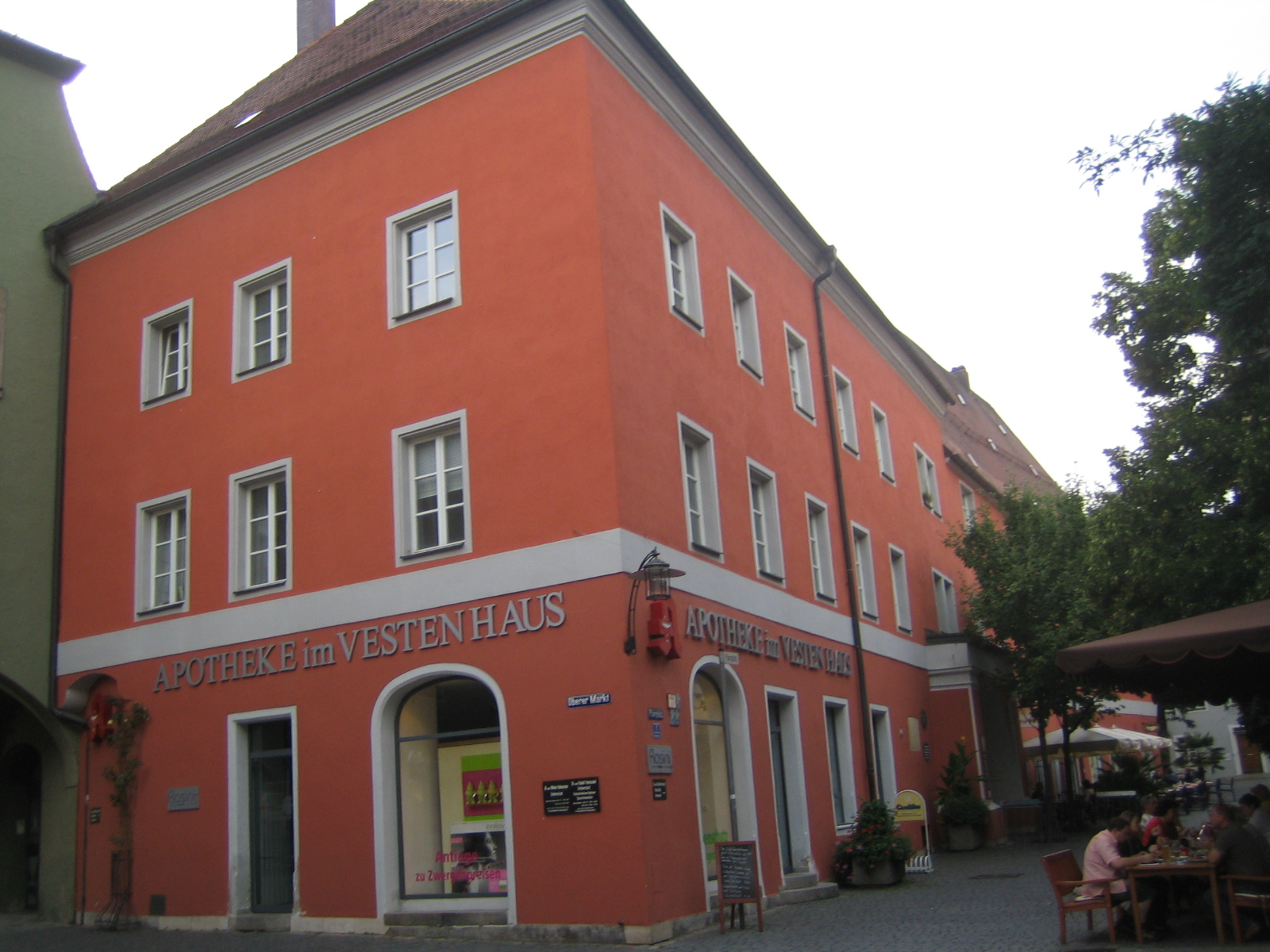 Pfarrplatz 1 "Vestes Haus" (Veste), langgestreckter zweigeteilter Baukörper, dreigeschossig; Wohnbau im Kern 1493, vorspringendes Portal von 1543; nördlich Speicherbau mit Torbogen; Verbindung zum Oberen Tor; rückwärtig Rest der Stadtmauer, 14. Jahrhundert.